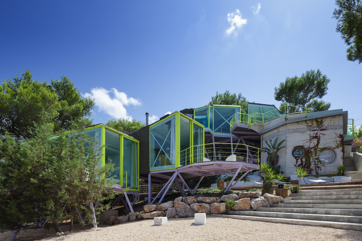 House designed by Andrés Jaque in Cala Vadella, San José (Ibiza).